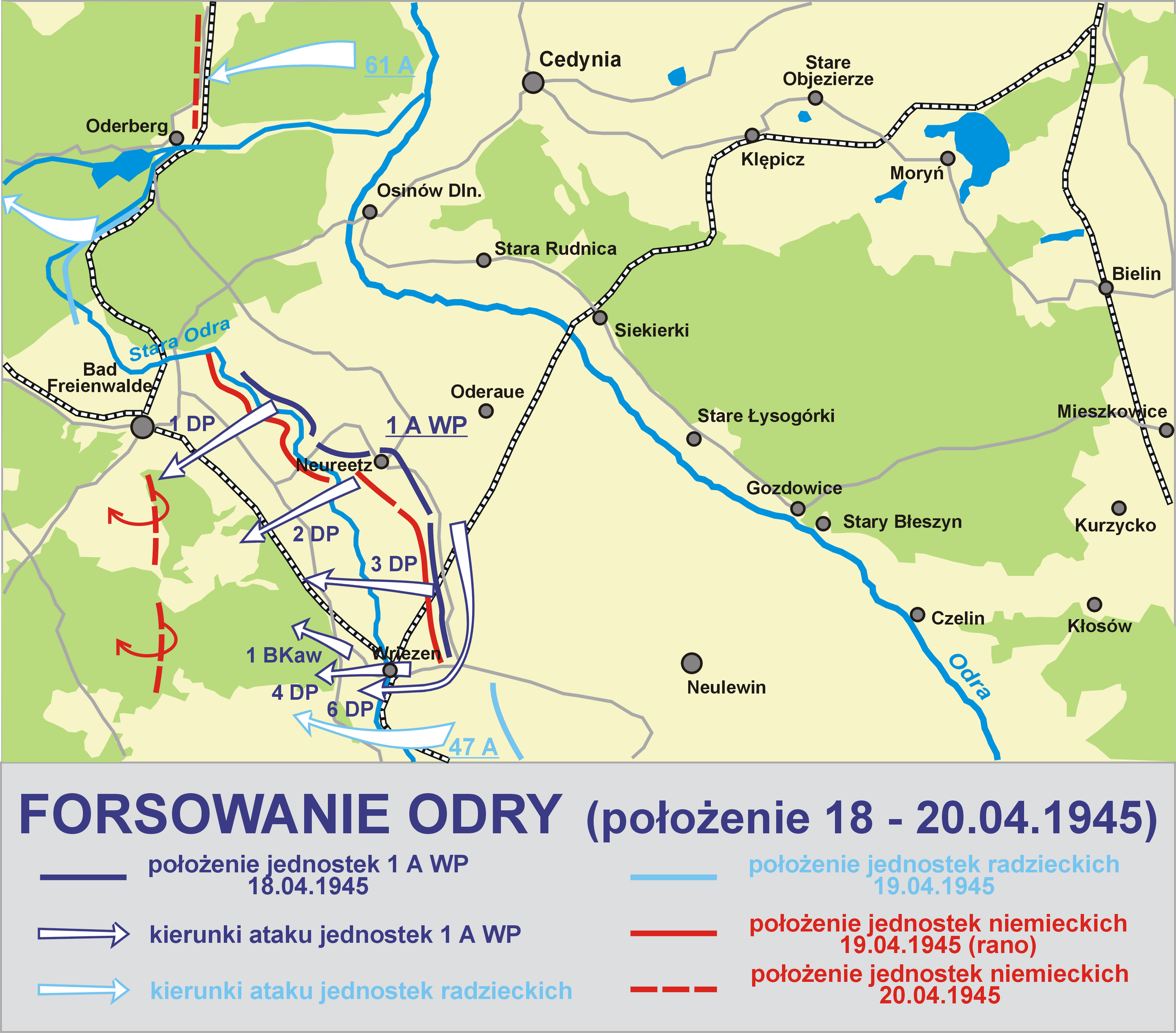 Forsowanie Odry położenie 18-20.04.1945